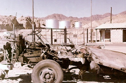 שלד המשאית שנותר לאחר הפיצוץ 26 ינואר 1970